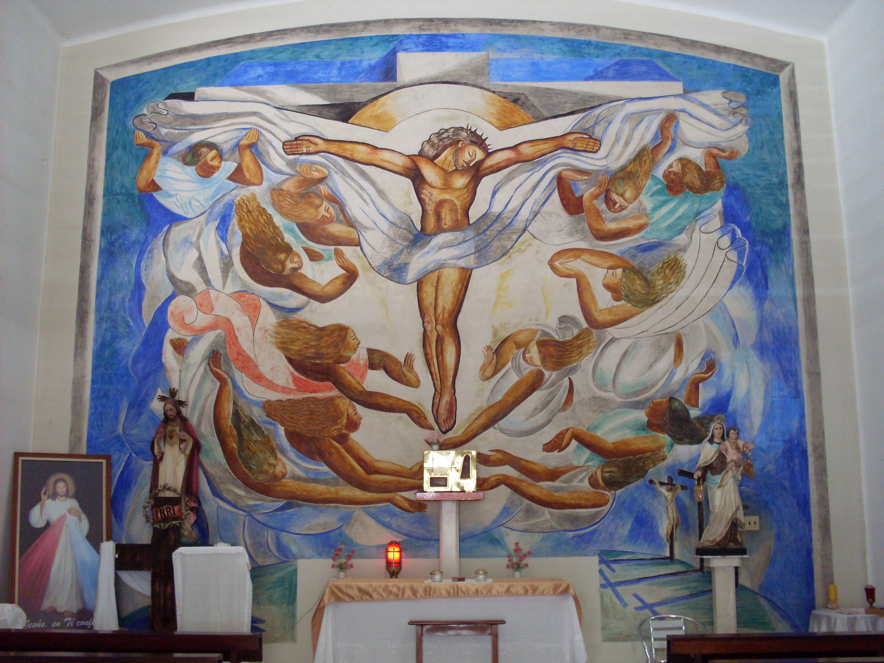 Mural de Francisco Narváez. Título: Sin título. Autor: Francisco Narváez. Año: 1950. Ubicación: Universidad Central de Venezuela. Edificio de la Capilla del Hospital Universitario de Caracas.